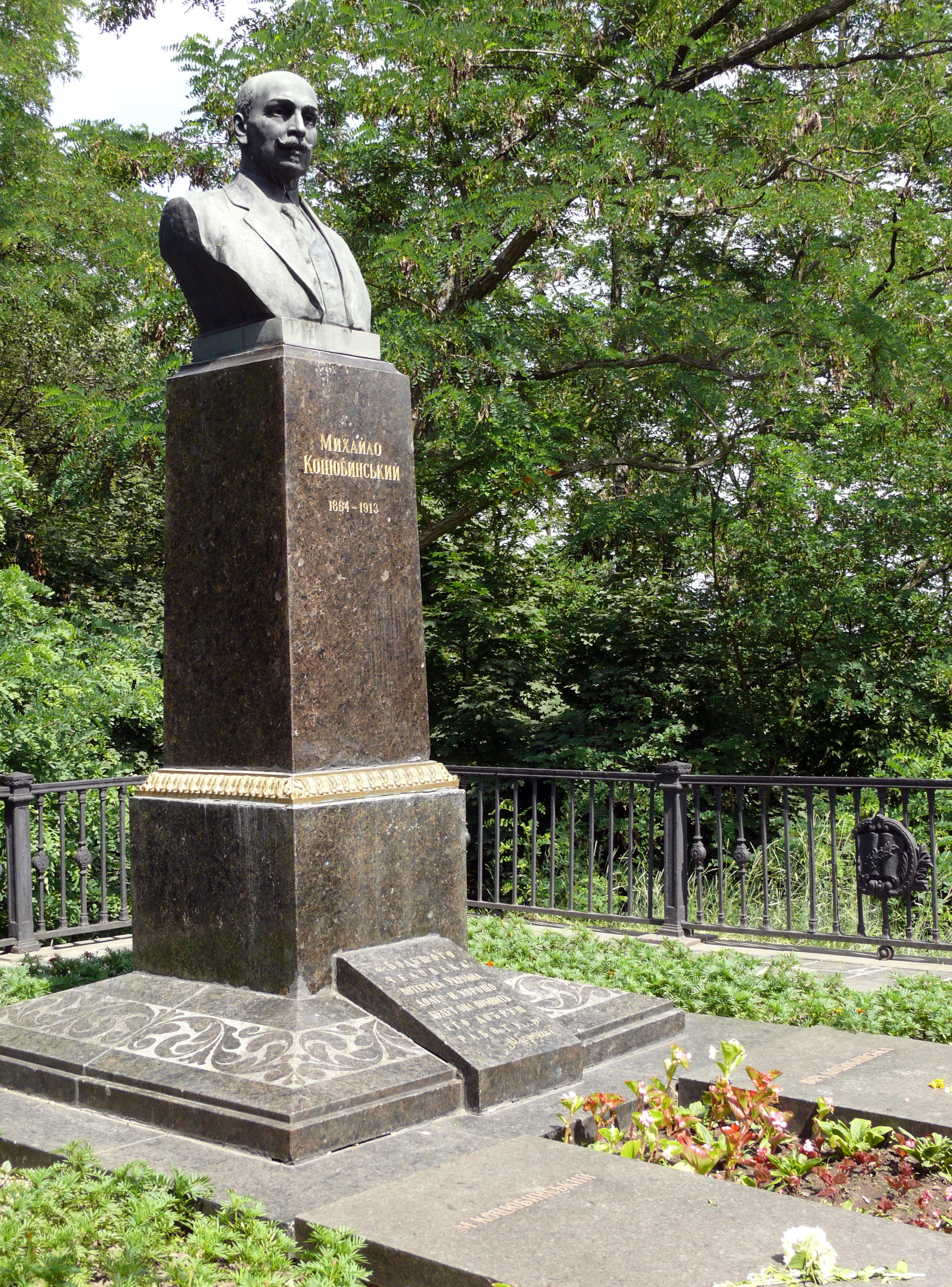 Могила Михаила Михайловича Коцюбинского и его жены Веры Устиновны Коцюбинской (Укр. Михайла Михайловича Коцюбиньського та його дружини Віри Устинівни Коцюбиньської)на Болдиной горе (Болдиных горах). Памятник и могильные плиты расположены на терассе вынесенной на столбах над склоном горы с насыпью. Терасса оргаждена оградой с четырех сторон, со стороны парка есть широкий проход. Ограда украшена изображениями со свитками пергамента накрытых ветвью. На левой могильной плите надпись "М. Коцюбинський", на правой - "Віра Коцюбинська". На подножии памятника написано: "Большого человека потеряла Украина, долго и хорошо она будет помнить его добрую работу... М.Горький". Бюст писателя повернут лицом к Ильинсой церкви, спиной - к курганам Безымянный и Гульбище. Не далеко расположена могила украинского фольклёриста и этнографа О.В. Марковича. Украина, Чернигов, ул. Толстого. Камера: Panasonic DMC FZ-50; диафрагма 4,5; экспозиция 1/200; режим - Програмная съемка. Июнь, солнечно, малая облачность, после полудня, летнее время.